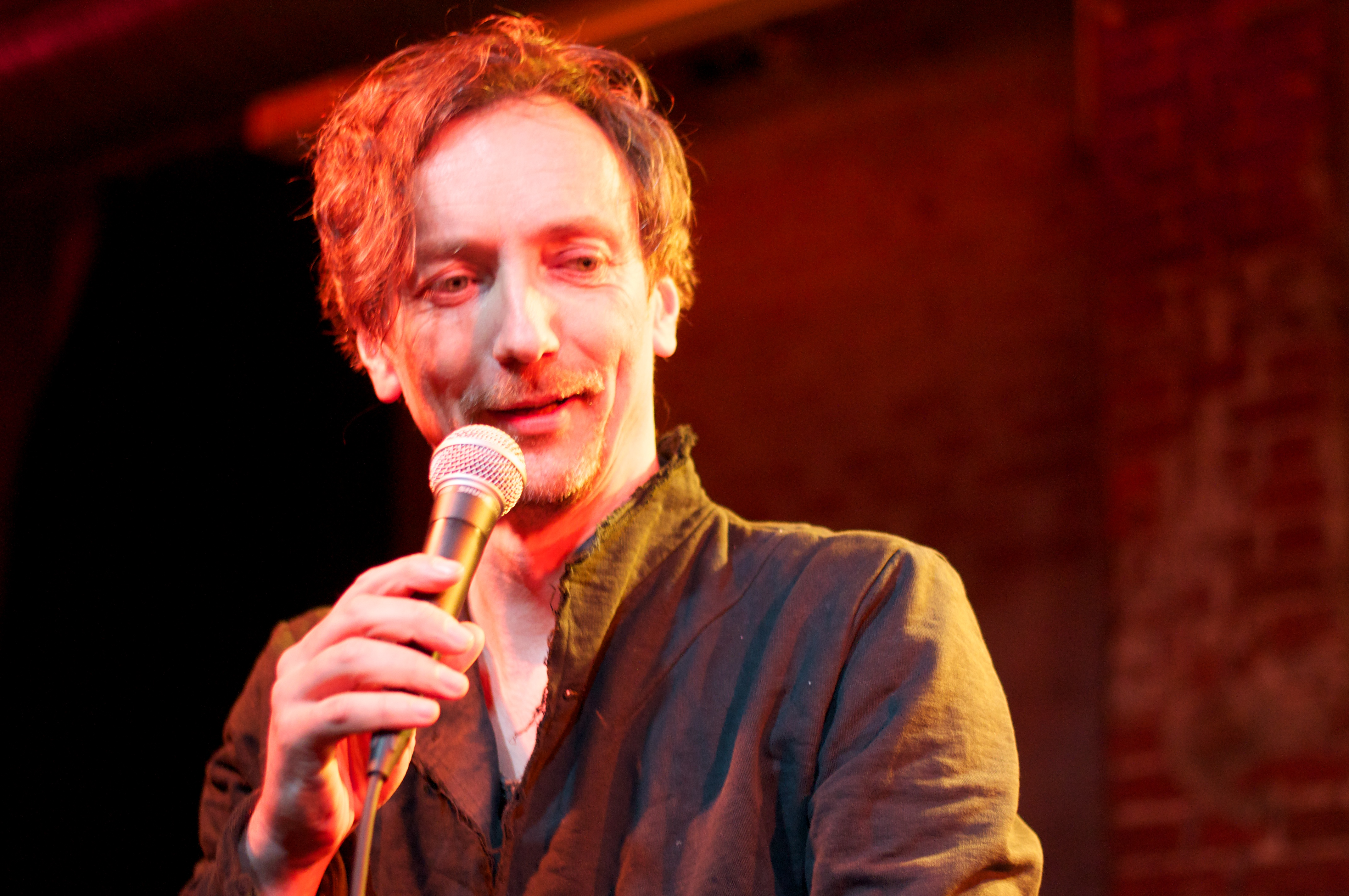 Volker Bertelmann performing in Nochtspeicher Hamburg